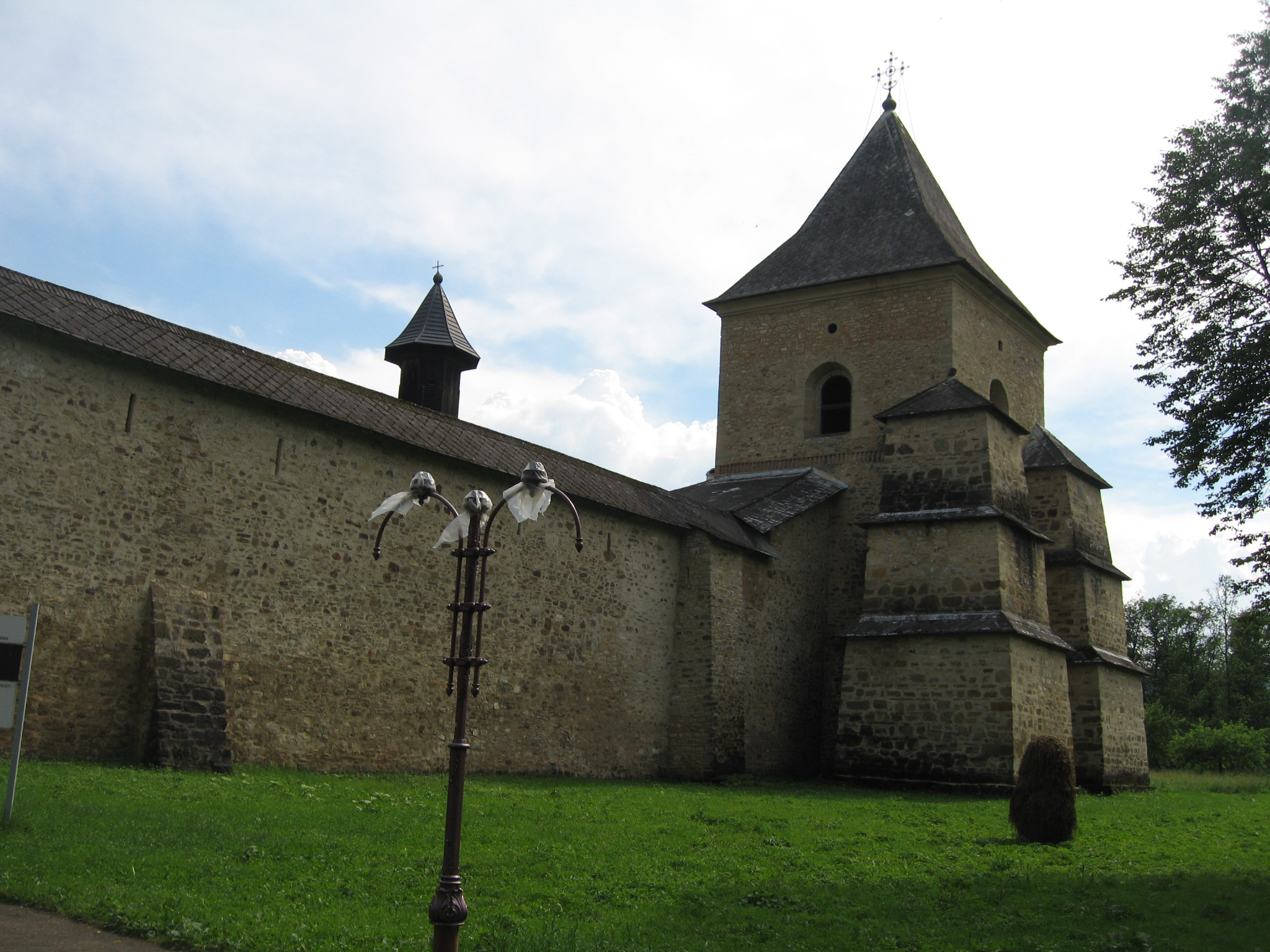 Mănăstirea Suceviţa 05